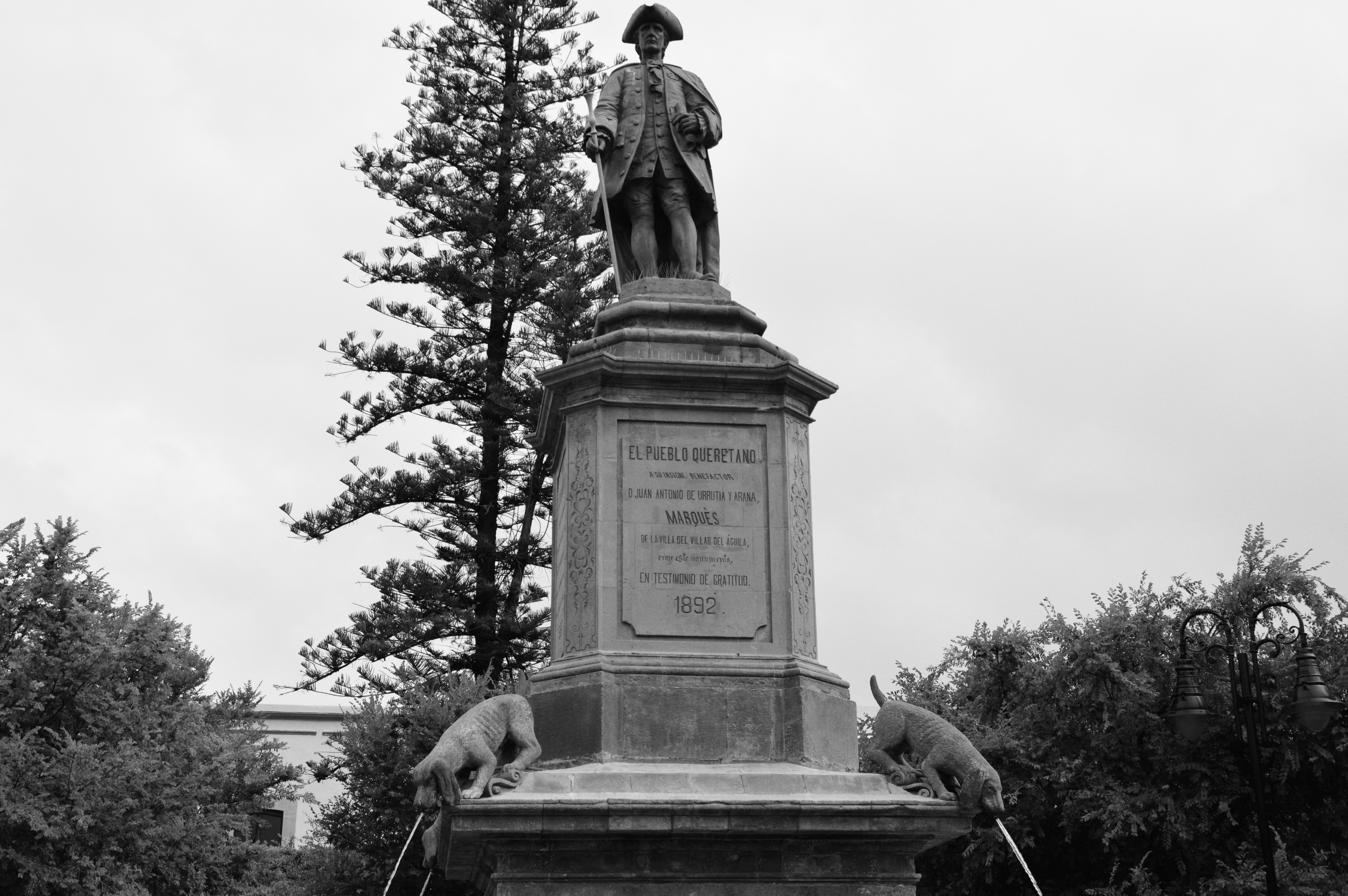 Estatua Juan Antonio Urrutia